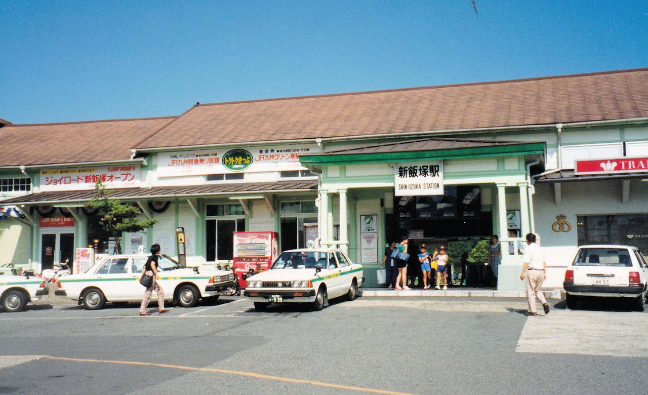 JR九州新飯塚駅（改築前）